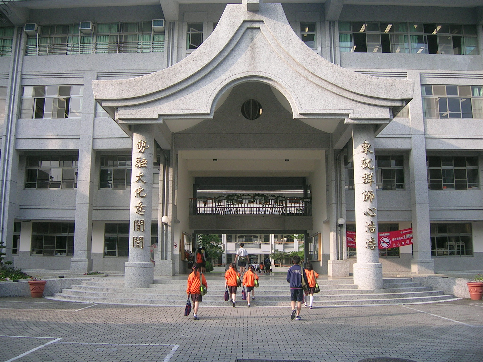 臺中縣東勢國中進入正門後的北樓。